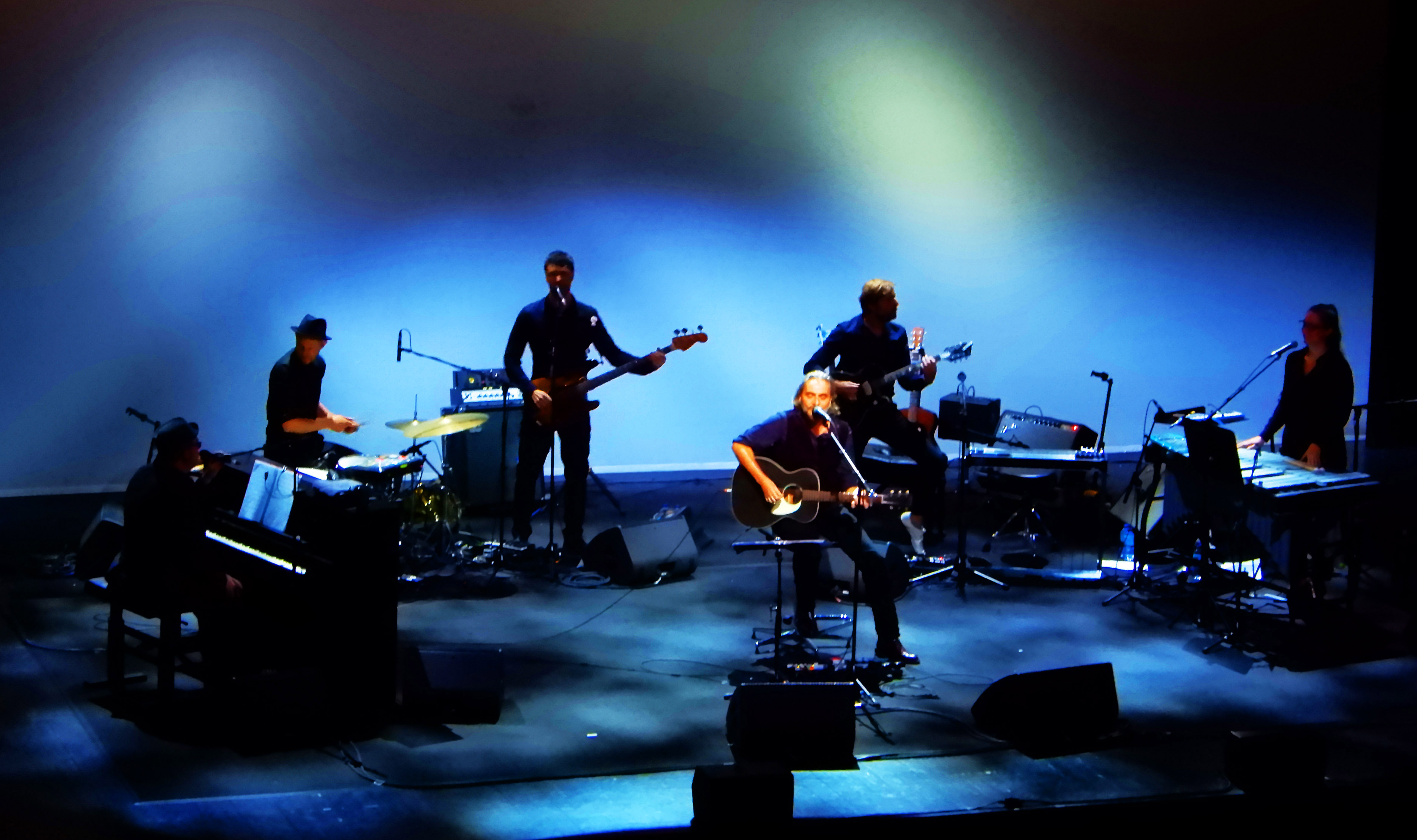 Stephan Eicher en concert au palais des arts et des congrès de Vannes le 4 octobre 2019